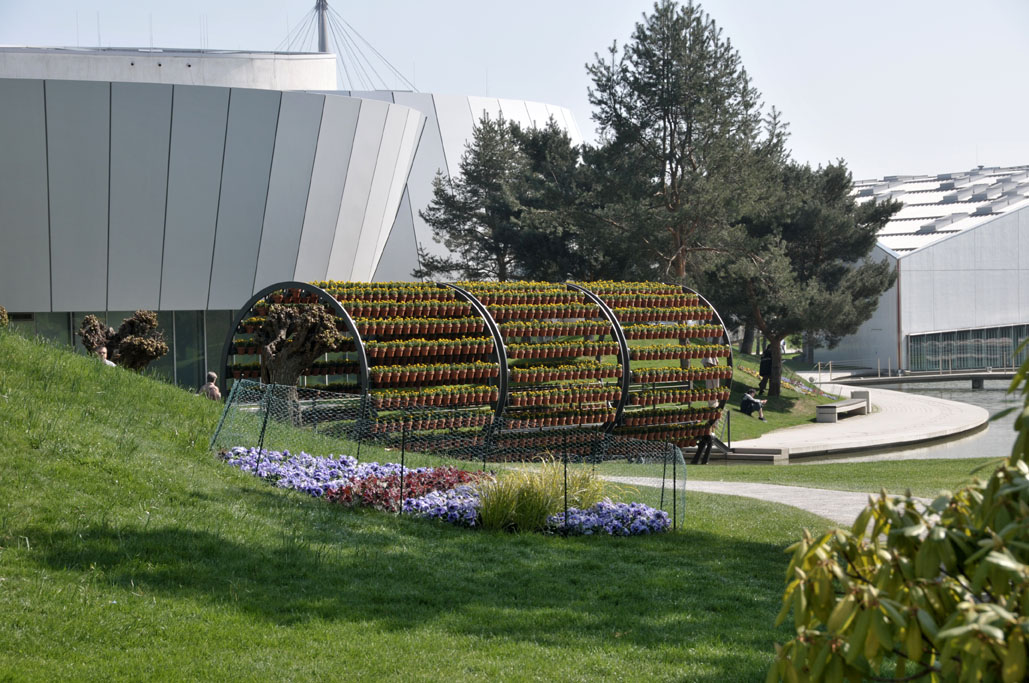 Der Dufttunnel in der Autostadt, Wolfsburg, Deutschland